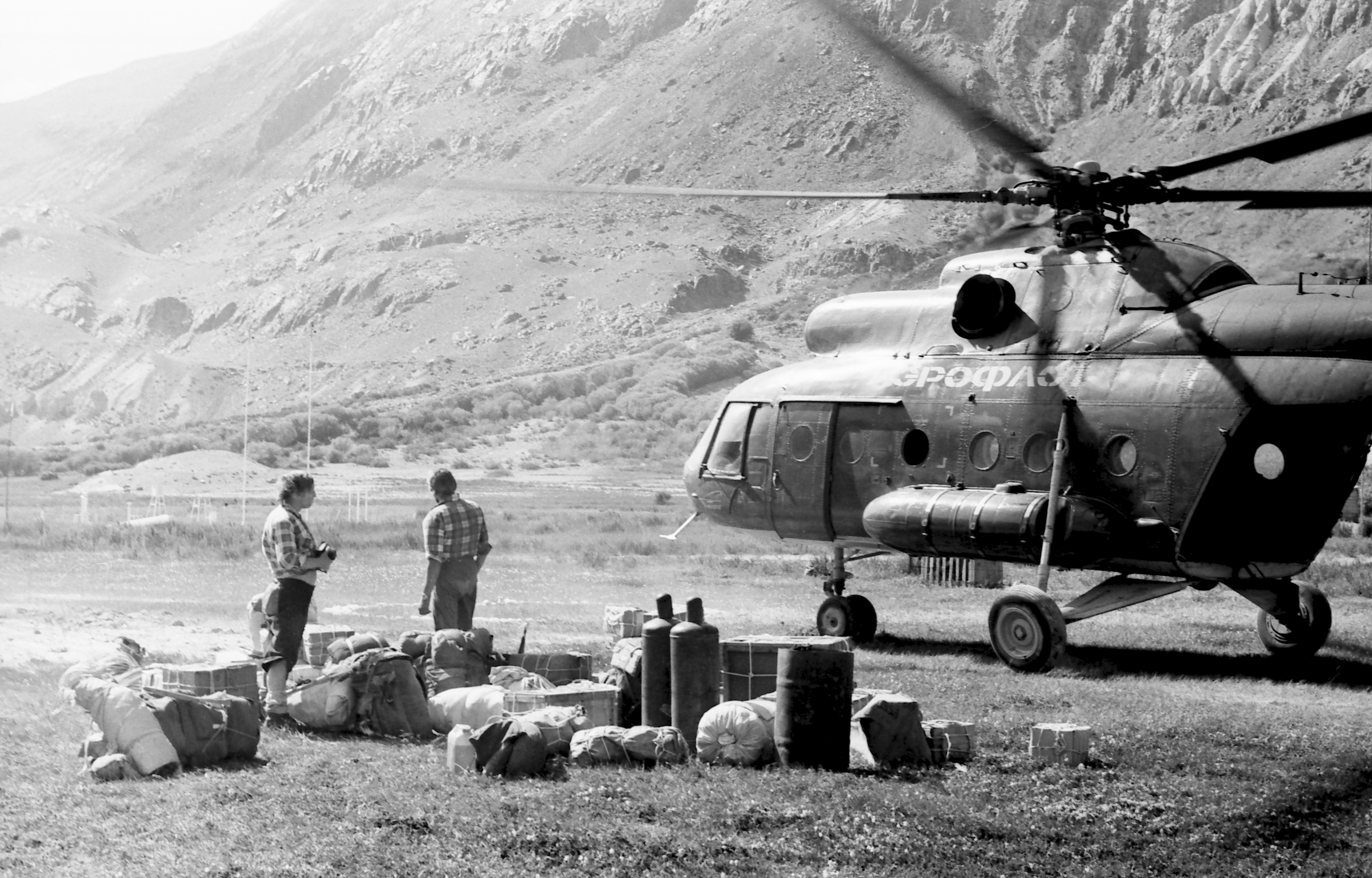 Ekspeditsioon mäetipule "Tartu Ülikool 350".